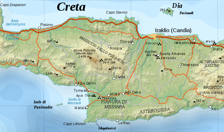 Mappa di Creta centrale in Italiano